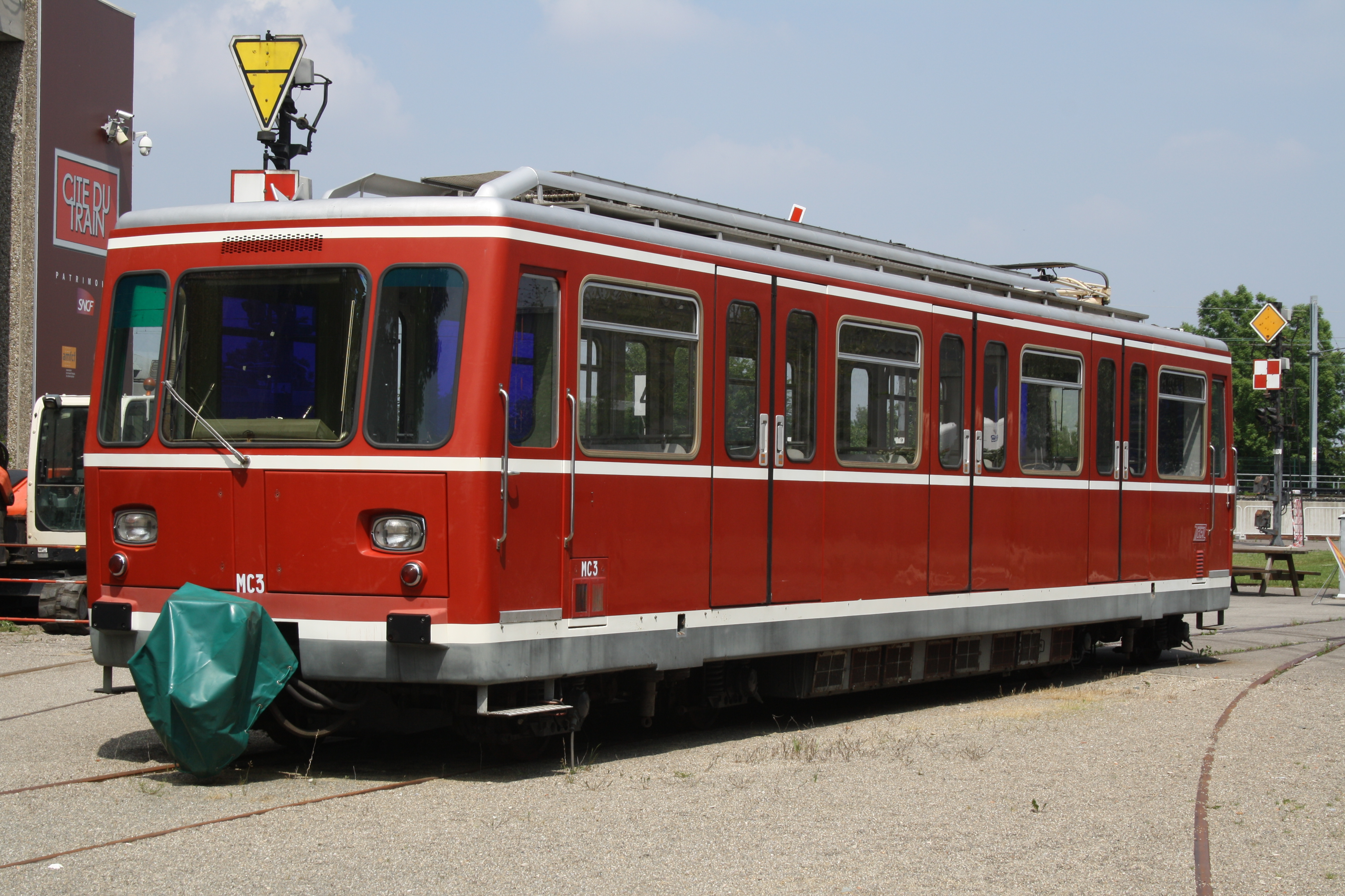 Triebwagen MC3 der Métro Lyon, ausgestellt in der Cité du Train